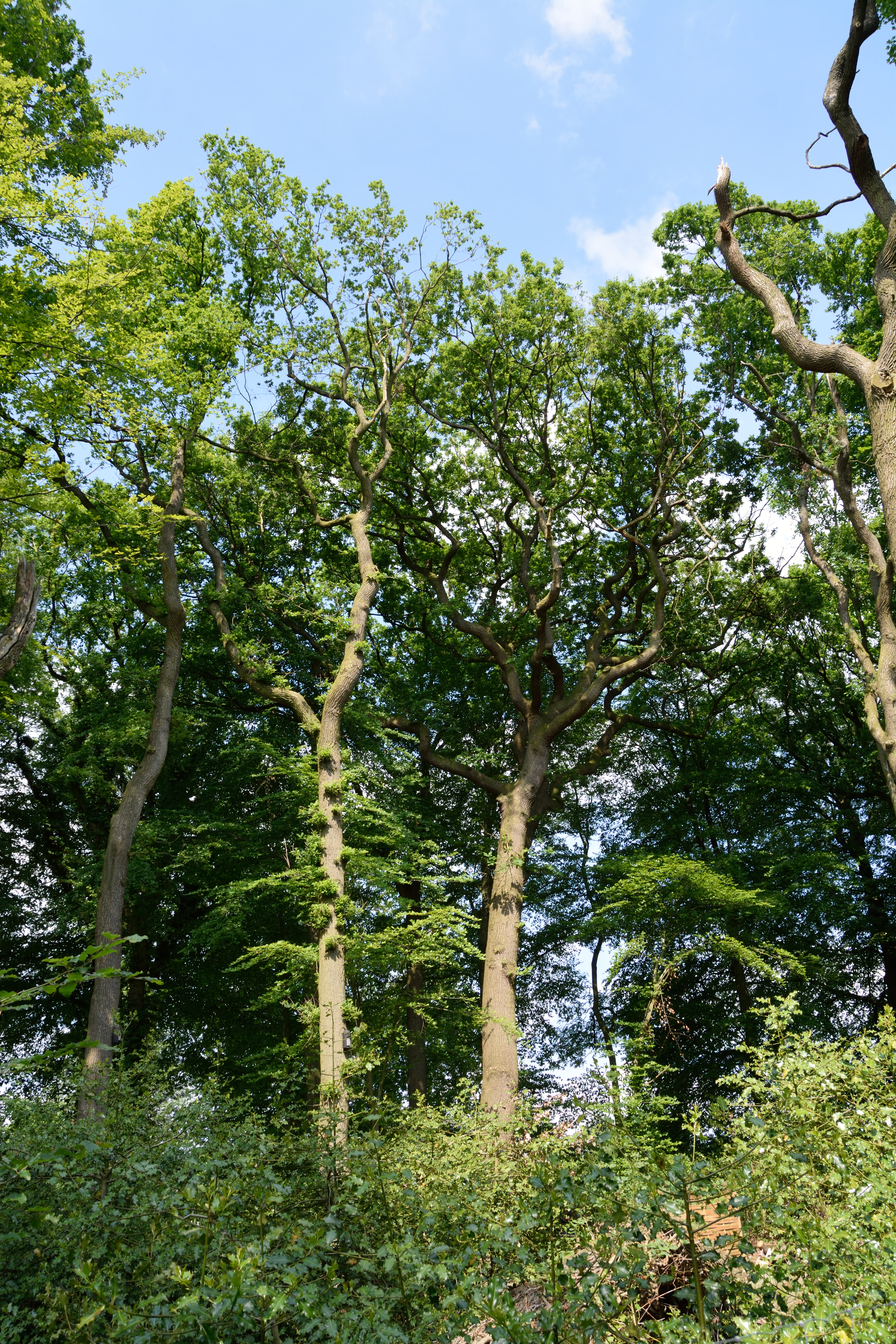 Der Kreis Steinburg hat mehrere Flächen unter dem gemeinsamen Namen "Landschaftsbestandteile und Landschaftsteile im Bereich mehrerer Gemeinden" zusammengefasst. Dieses Foto wurde in der Waldfläche „Hackstruck“ in Itzehoe aufgenommen, es ist das Teilstück Nr. 4.